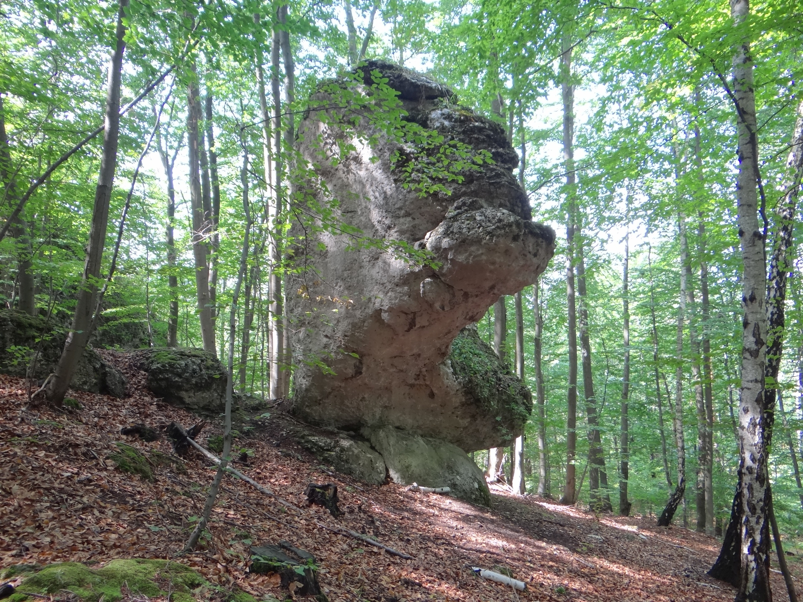 Skała Dziób Jastrzębia na wzgórzu Jastrzębik w grupie Skał kroczyckich na Wyżynie Częstochowskiej